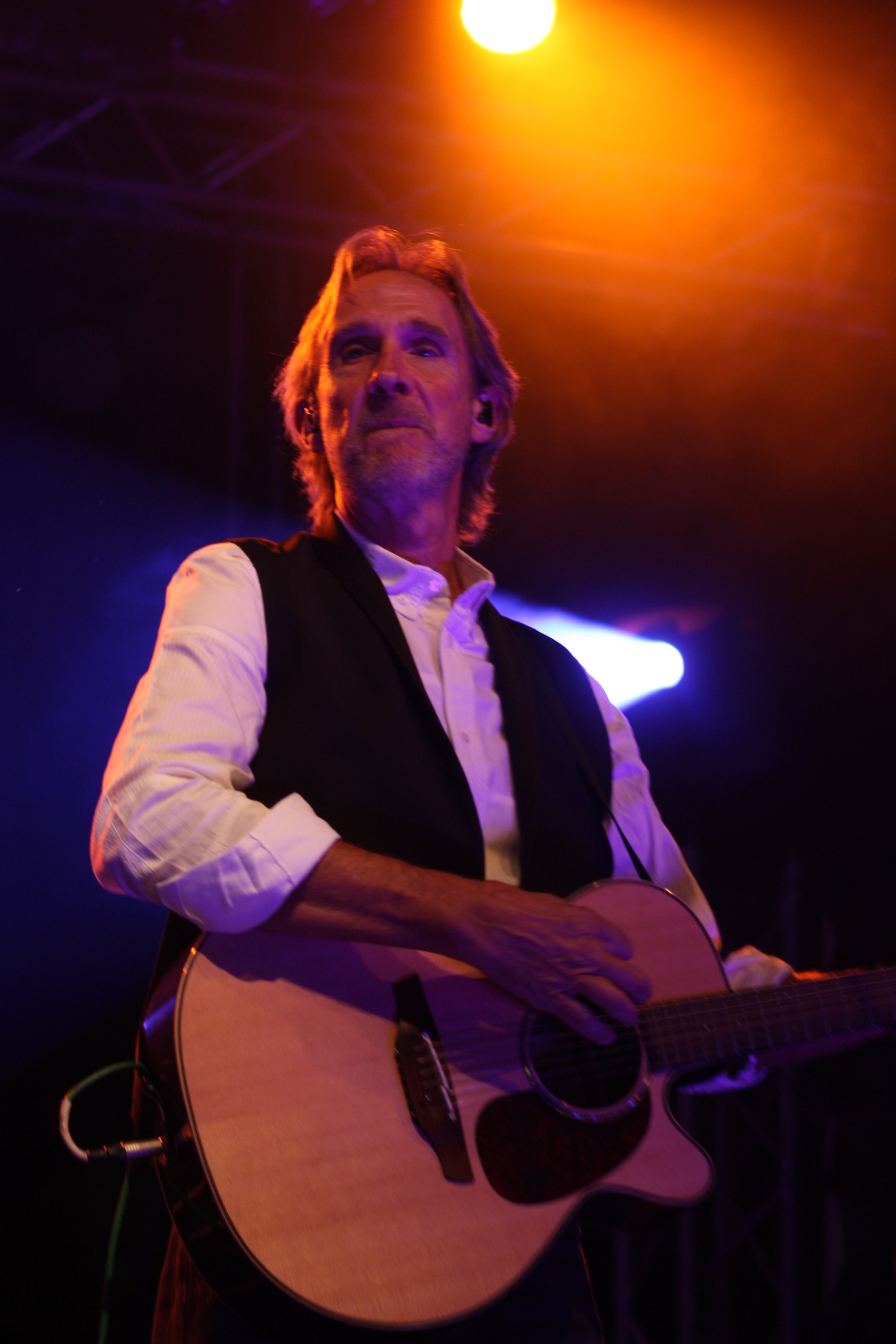 Wiesbadener Stadtfest 2013: Mike Rutherford von Mike & the Mechanics